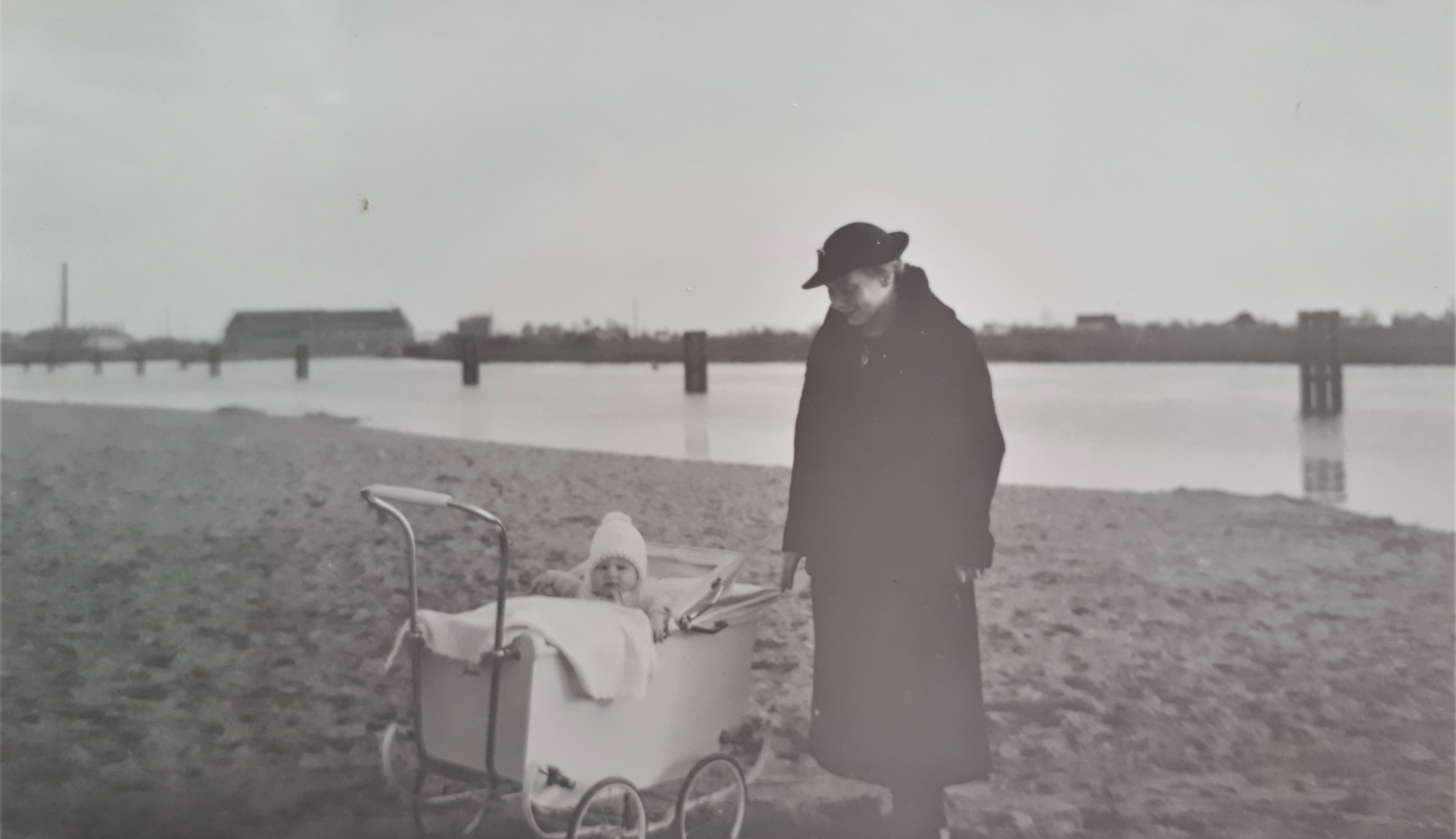 Der Strand "Lido" in Bremen-Hastedt, im Hintergrund das Weserwehr, 1935 (oder Ende 1934)